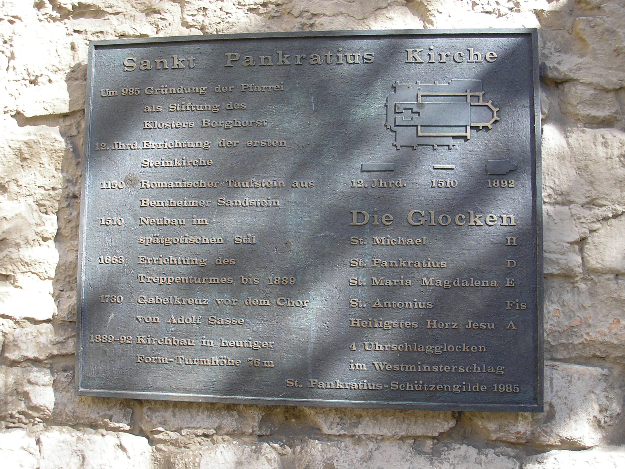 Gescher, Geläut von St. Pankratius